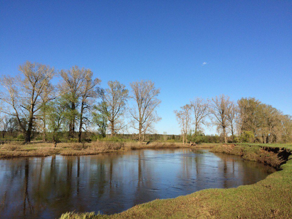 Река Иж, Памятник природы: Агрызский район РТ,Агрыз,Агрызский район, Татарстан This image is related to the protected area of Russia number 1610003